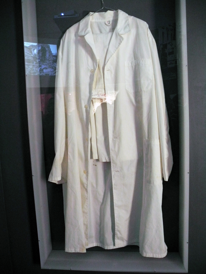 Izložba Domovinski rat u Hrvatskom povijesnom muzeju tijekom Noći muzeja.